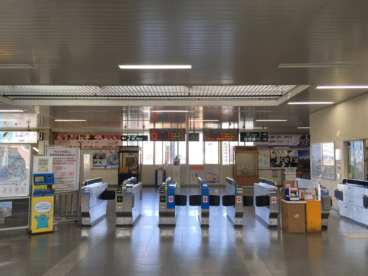 JR彦根駅改札口